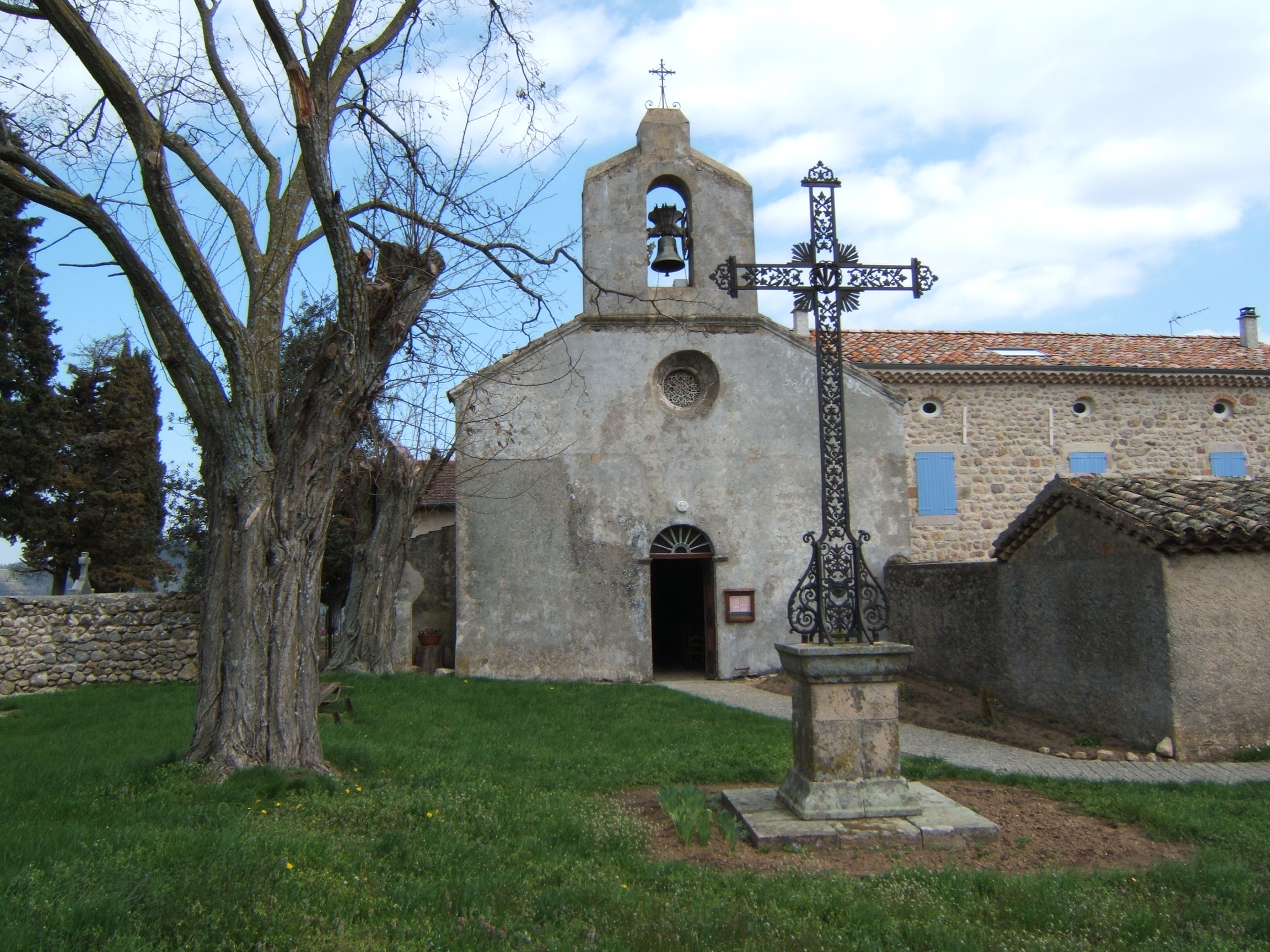 église Saint Michel